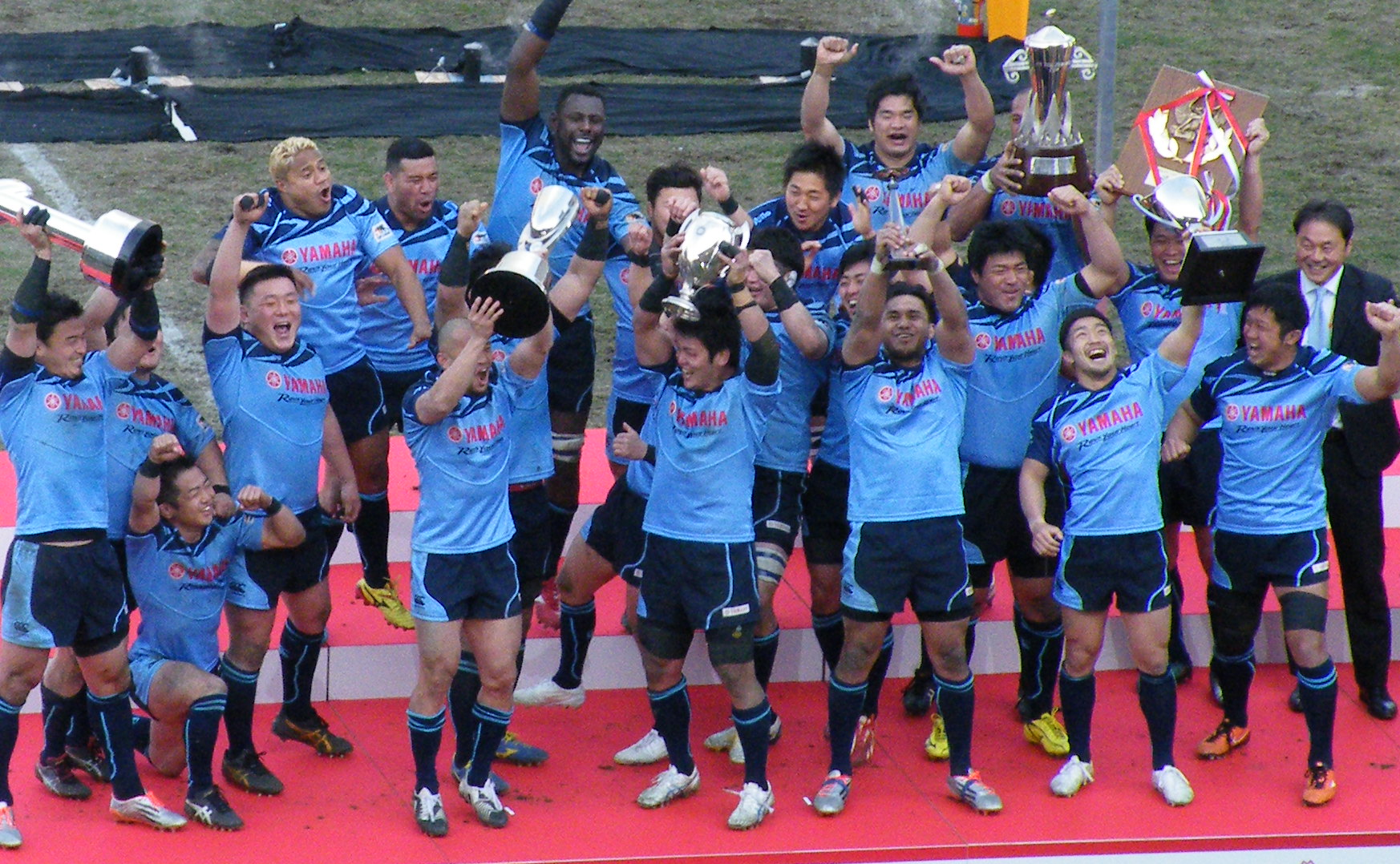 第52回日本ラグビーフットボール選手権大会優勝のヤマハ発動機ジュビロ